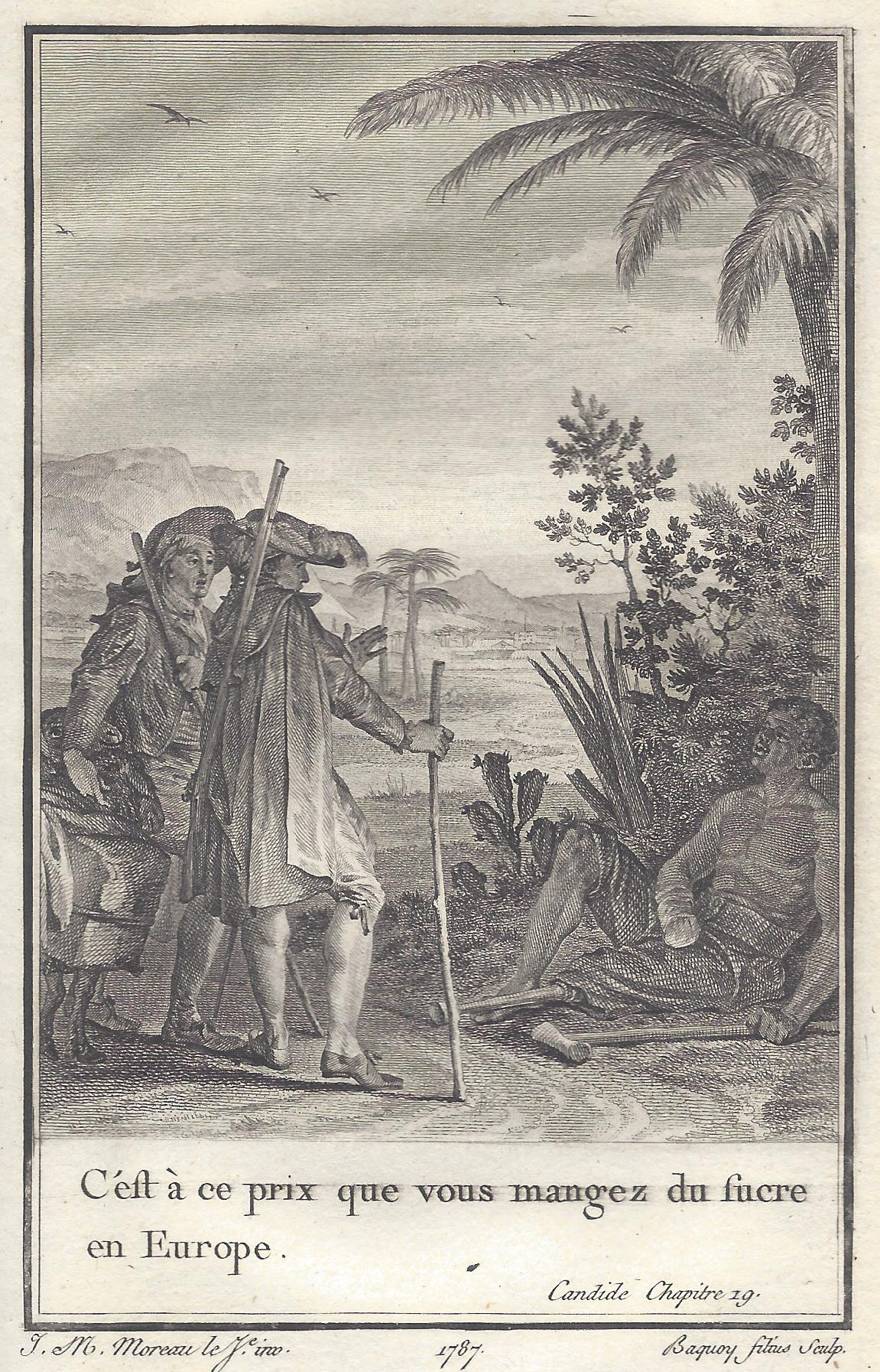 Jean-Michel Moreau: Illustration Kapitel 19 der Novelle Candide für die Ausgabe der Gesamtwerke Voltaires Kehl, 1787